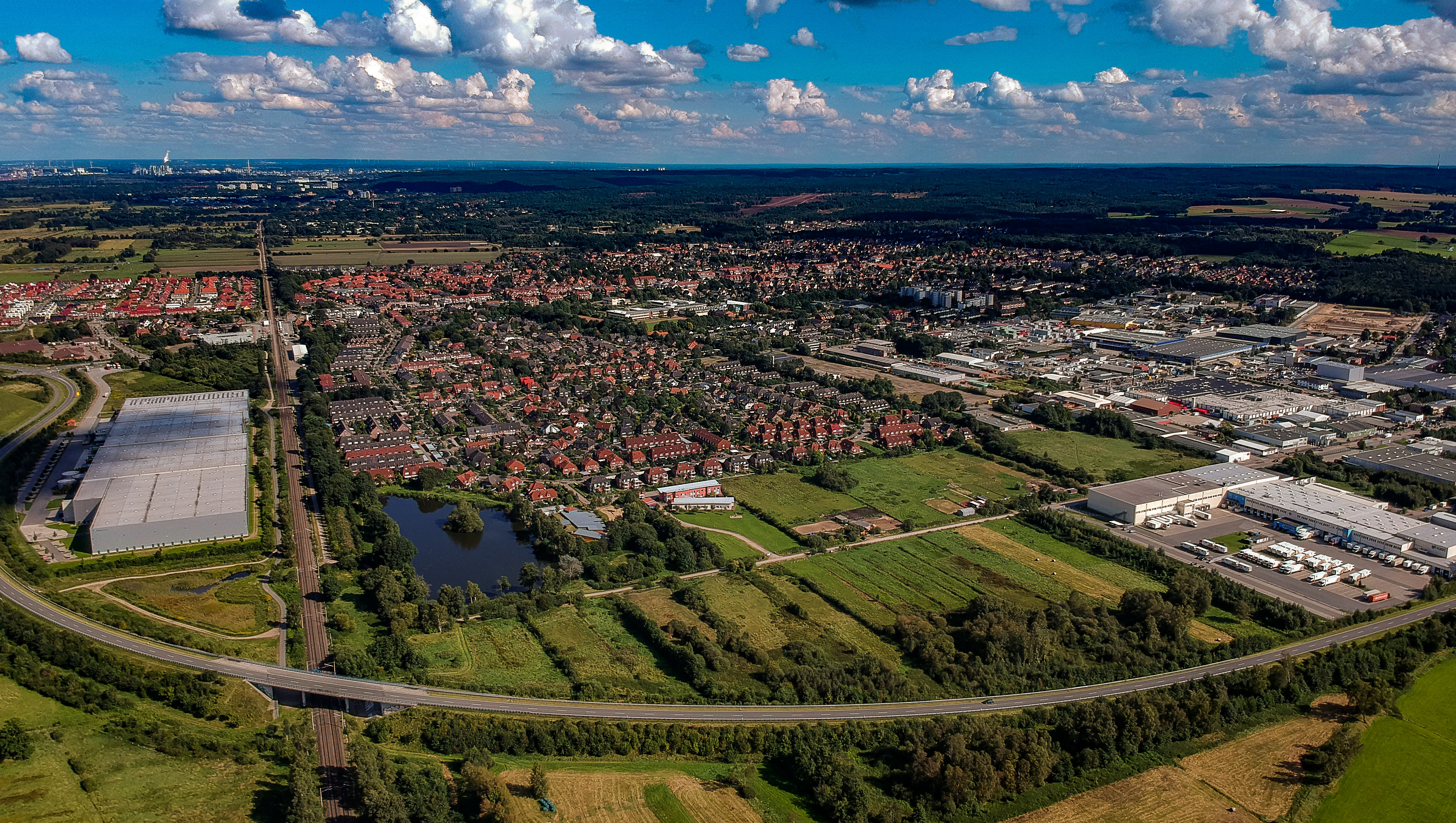 Luftaufnahme von Neu Wulmstorf